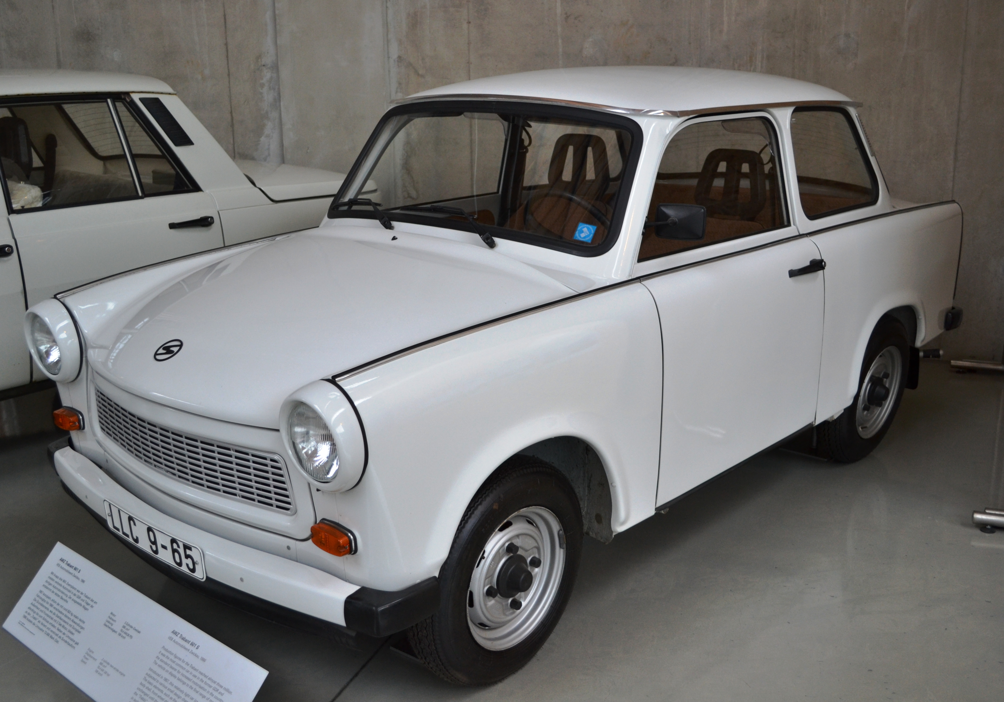 Der Trabant 601 S der DDR im Verkehrszentrum des Deutschen Museums - Halle I.